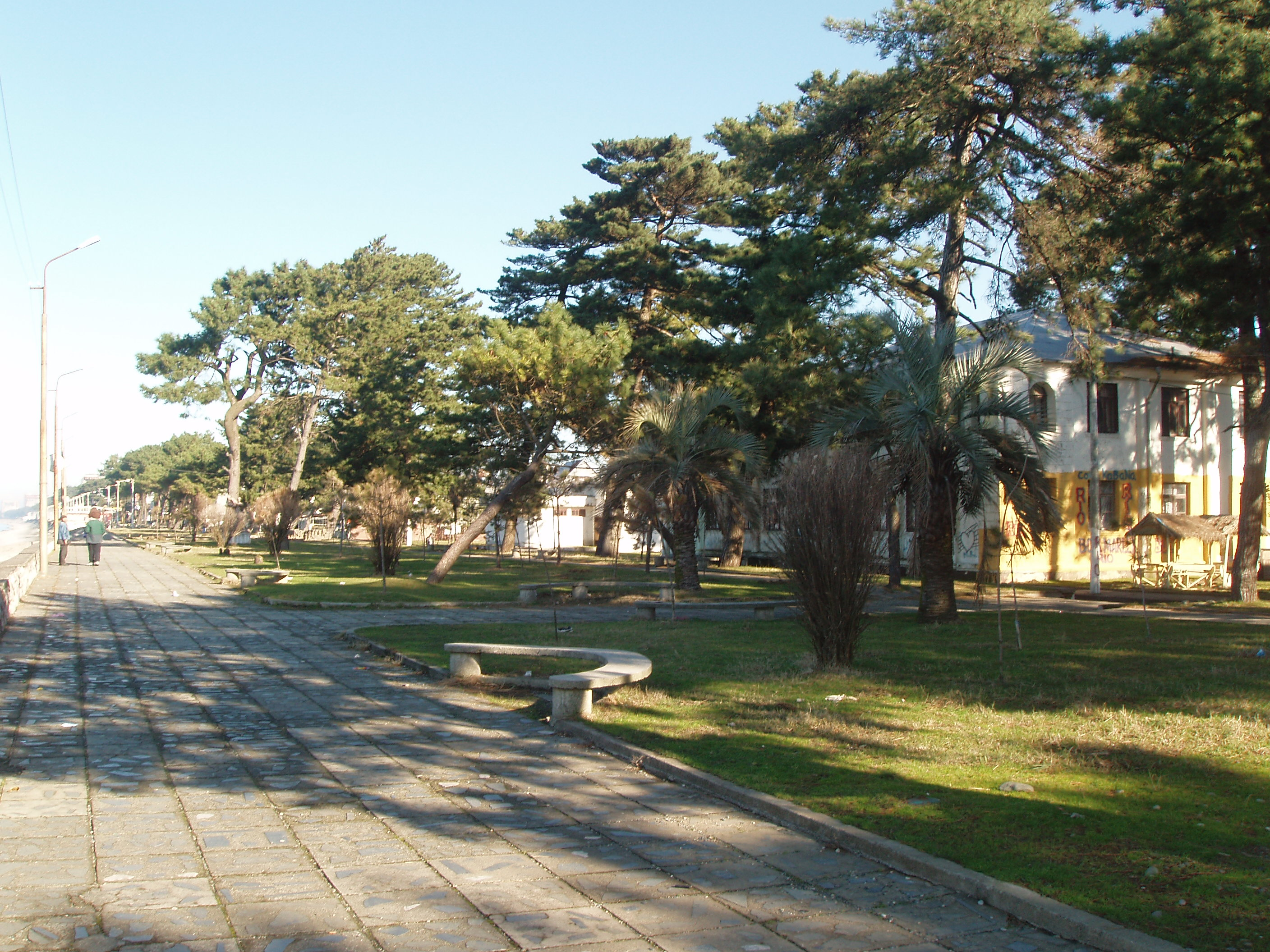 Набережная в Кобулети (январь).